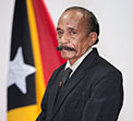 Cornélio da Conceição Gama, Abgeordneter des Nationalparlaments Osttimors